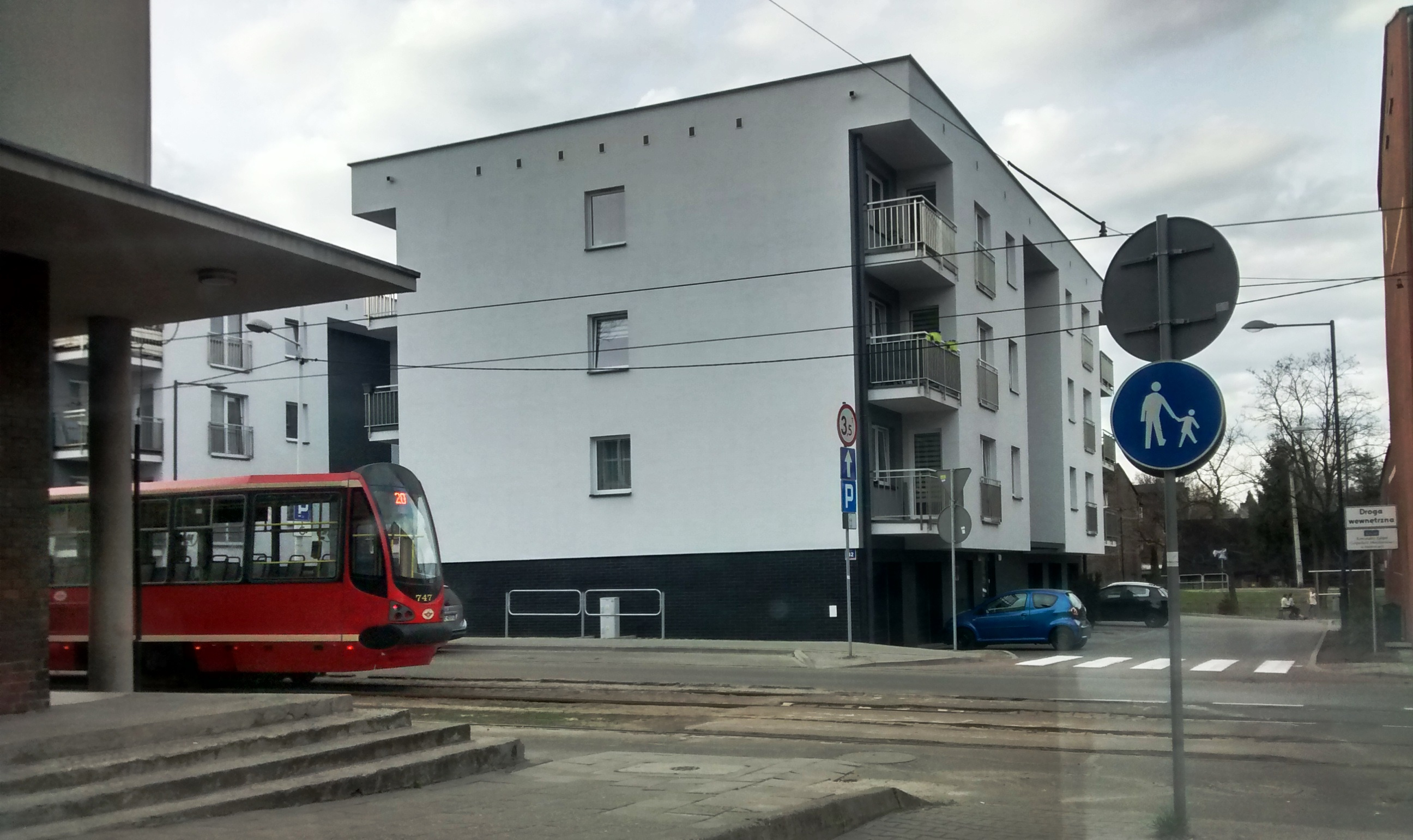 Zabudowania przy ul. Obrońców Westerplatte w Katowicach-Szopienicach